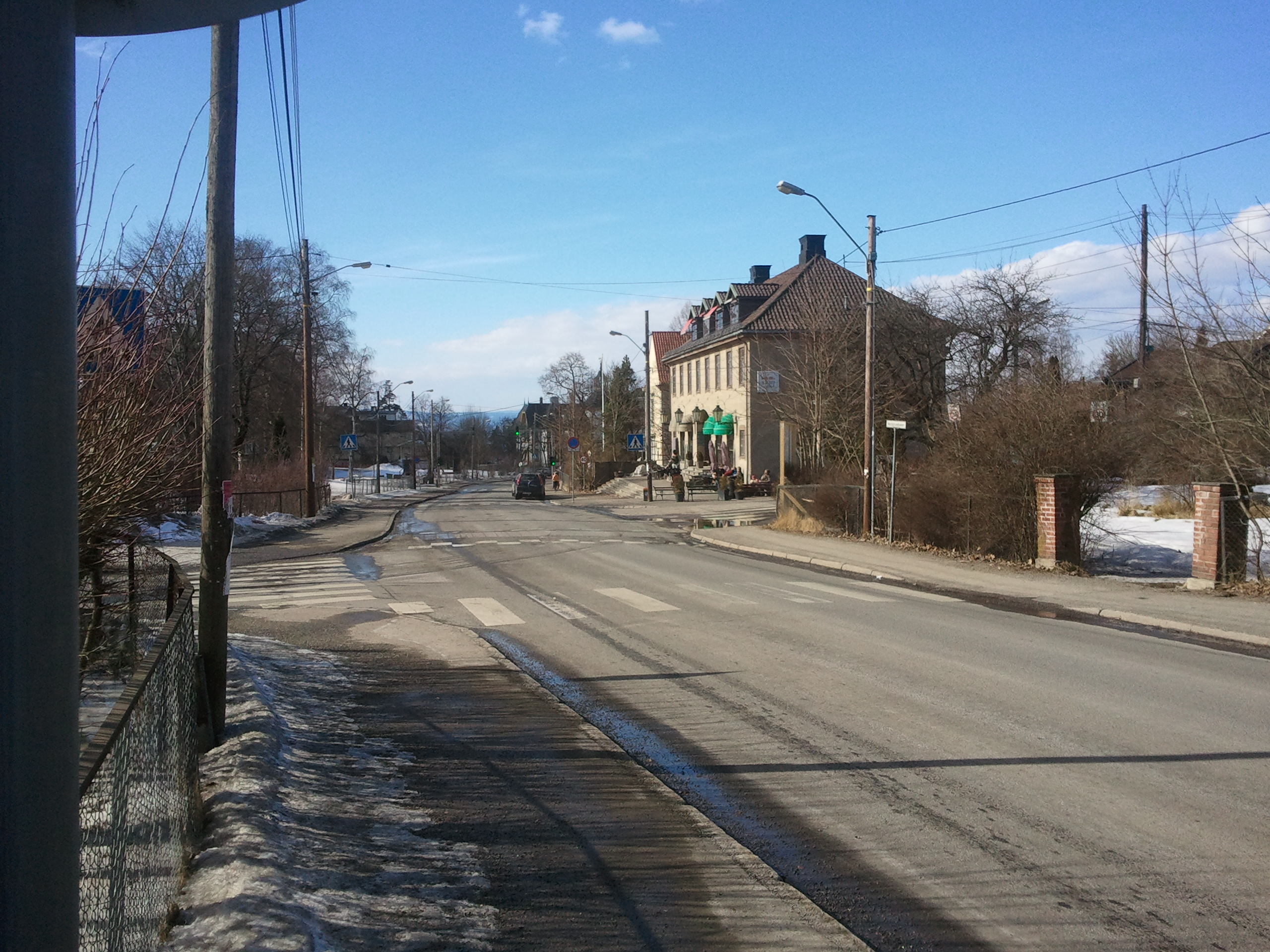 Nordstrandveien sett mot vest